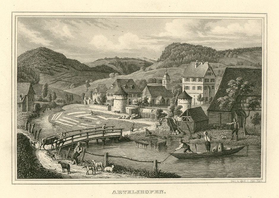 Stahlstich aus: Das Königreich Bayern. Seine Denkwürdigkeiten und Schönheiten […]. Hrsg. von Hermann von Schmid, verlegt und gedruckt bei G. Franz, München, 1879/1881.